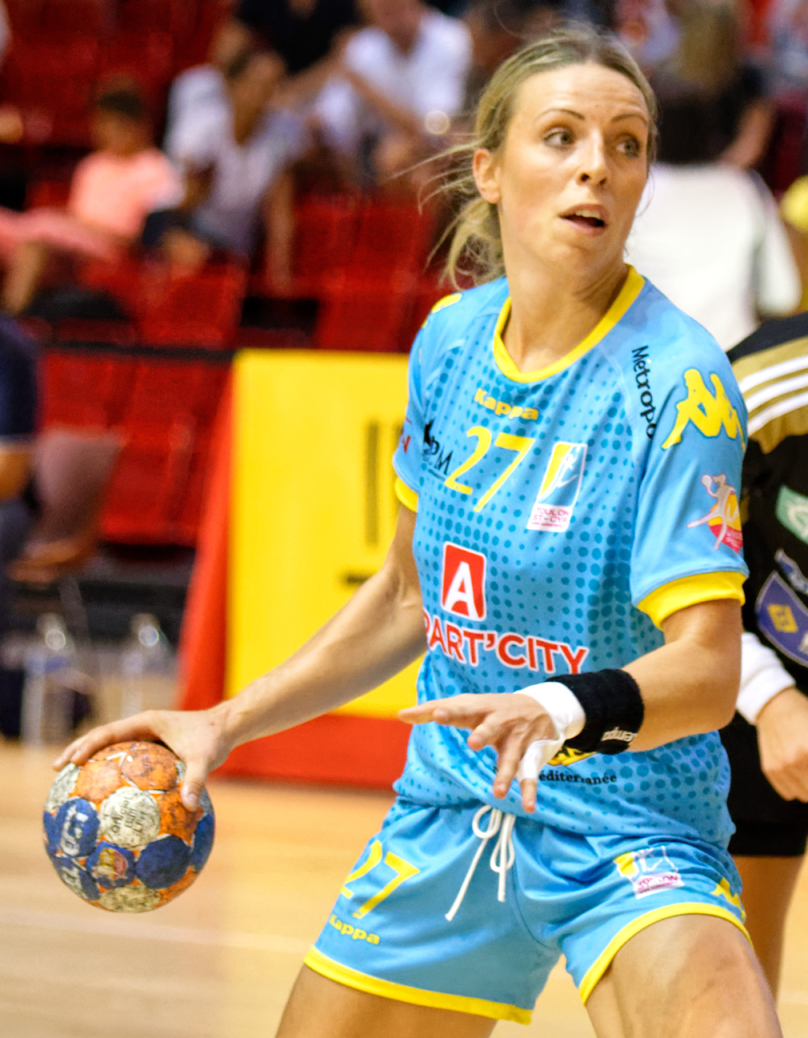 Rencontre de championnat en Issy Paris Hand et Toulon. A la Halle Carpentier, Paris, le 30 août 2015.